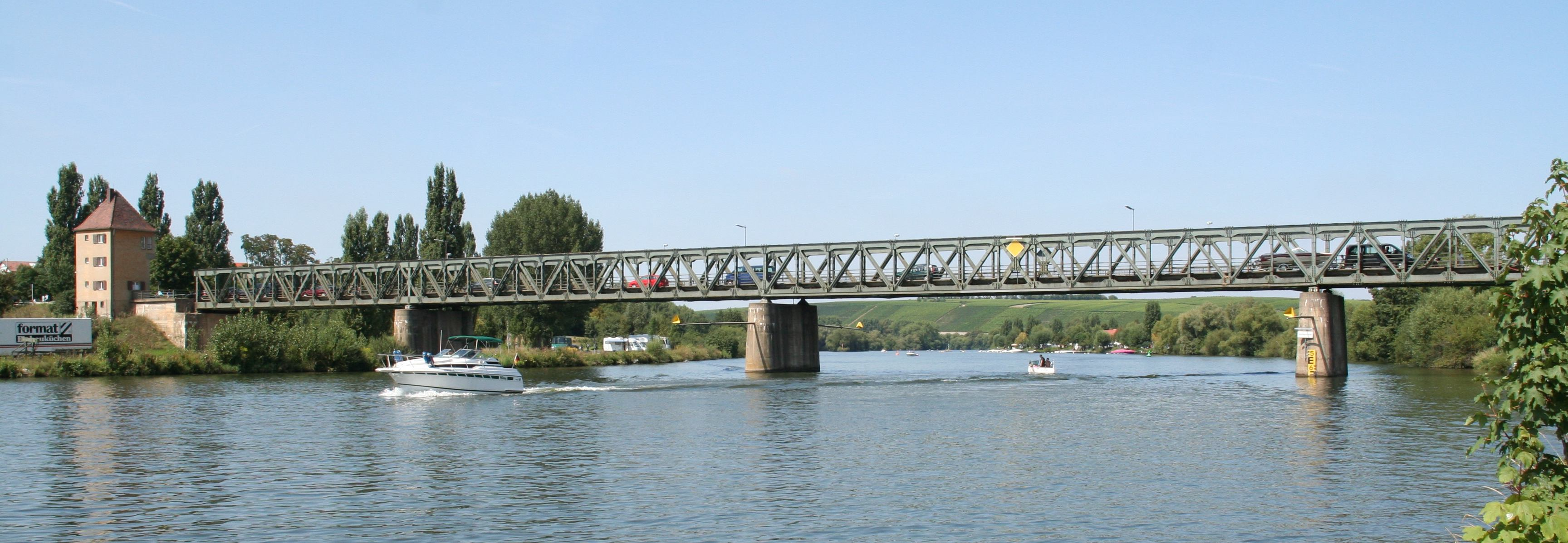 Mainbrücke Volkach, Landkreis Kitzingen, Unterfranken